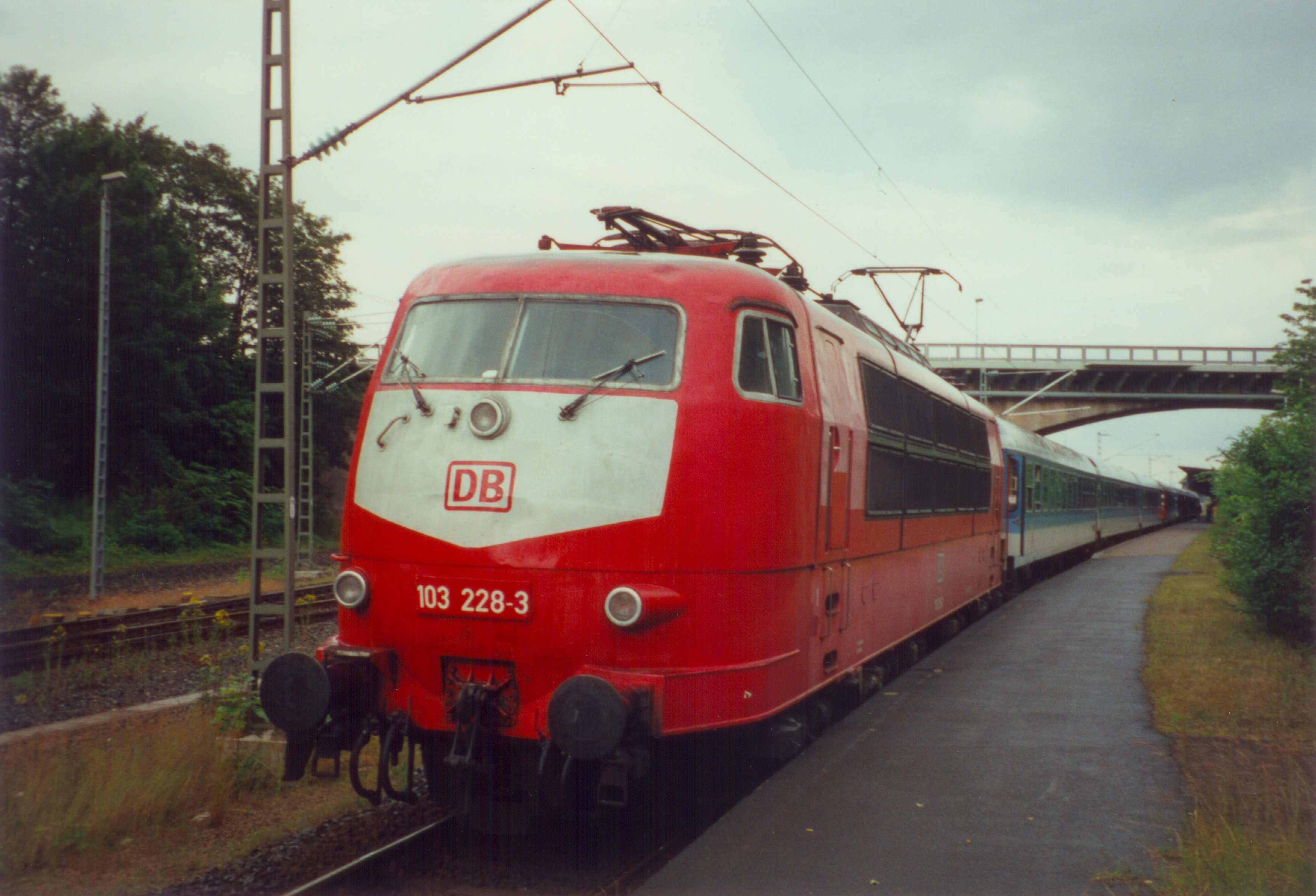 Deutsche Bahn AG's 103 228-3 in Flensburg with a passenger train.